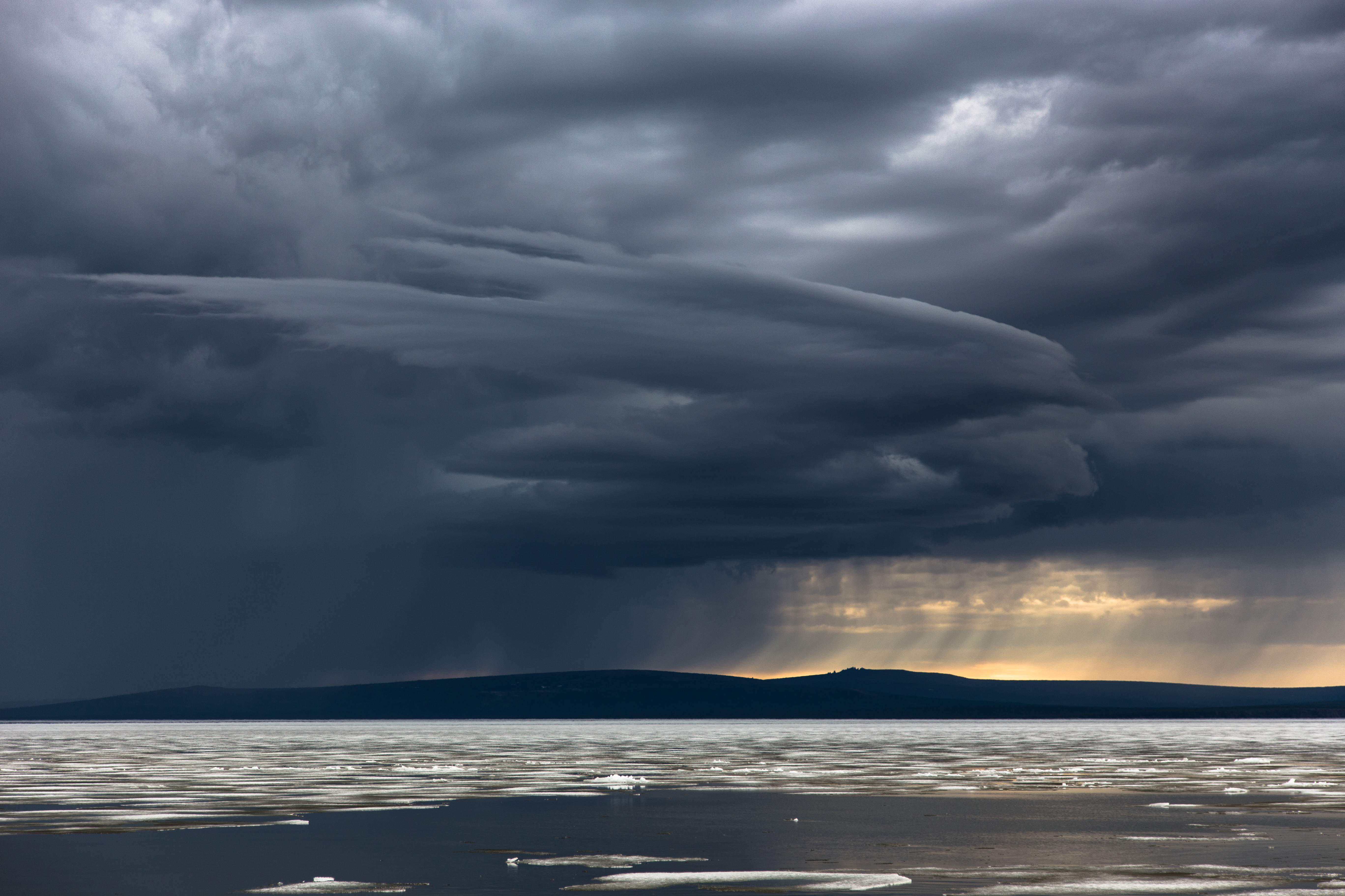 Озеро Ожогино: Расположен в административных границах Абыйского и Аллаиховского улусов, находится на левобережье реки Индигирка, Абыйский район, Якутия (Саха) This image is related to the protected area of Russia number 1410011